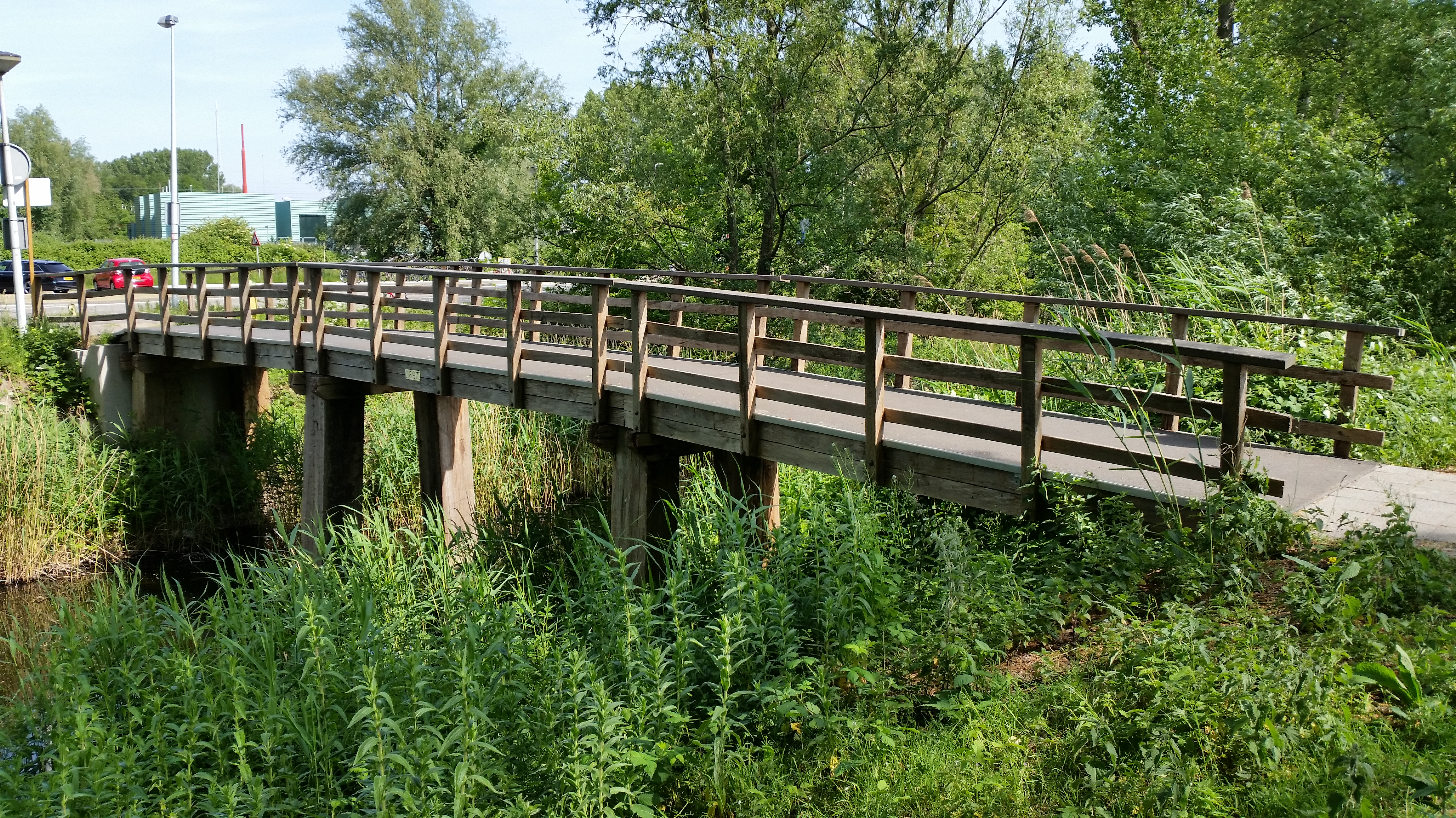 Impressie van brug 1897 in Amsterdam Nieuw-West nabij De Oeverlanden